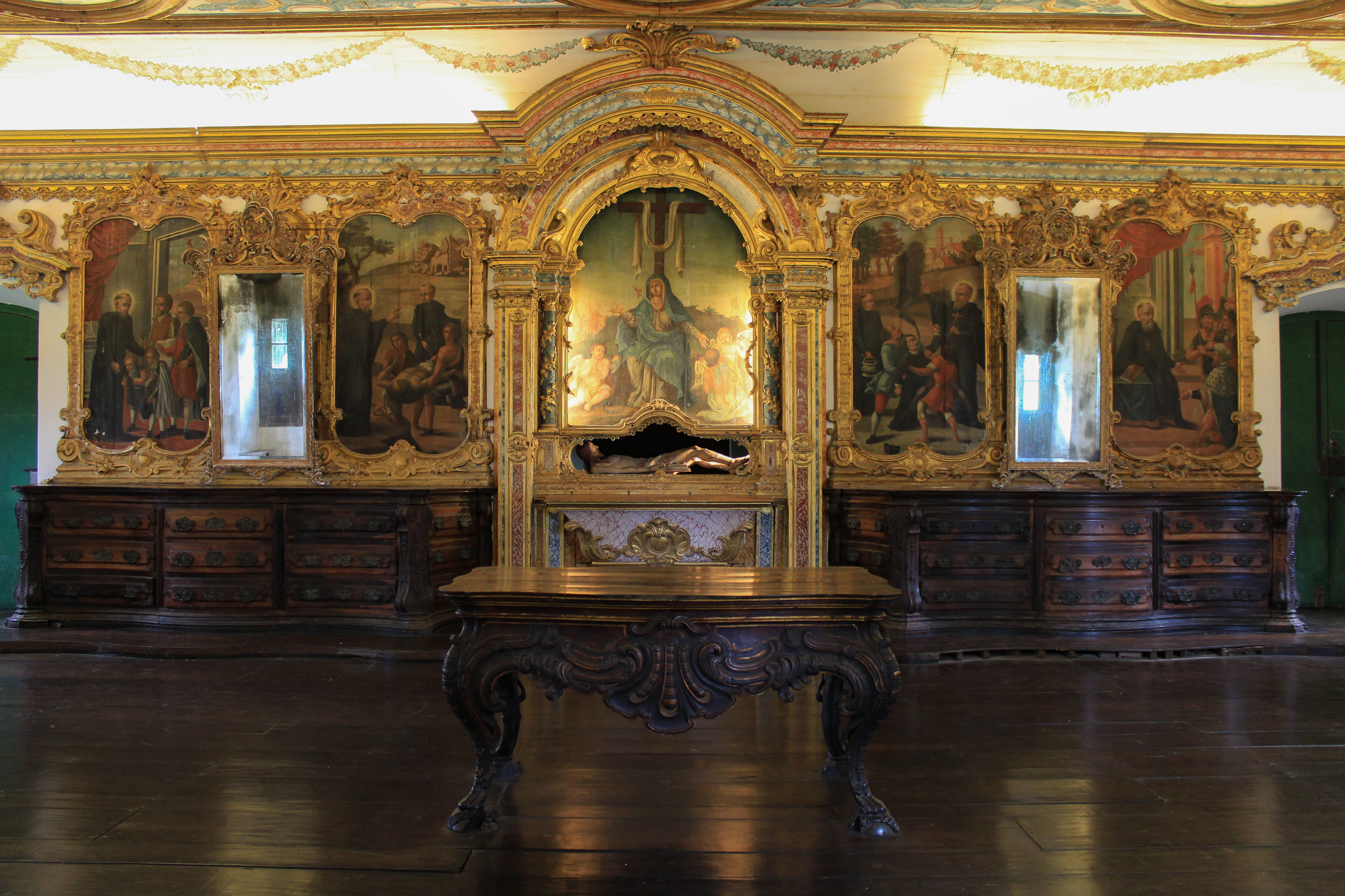 Esta é uma área situada dentro do mosteiro de São Bento de Olinda.